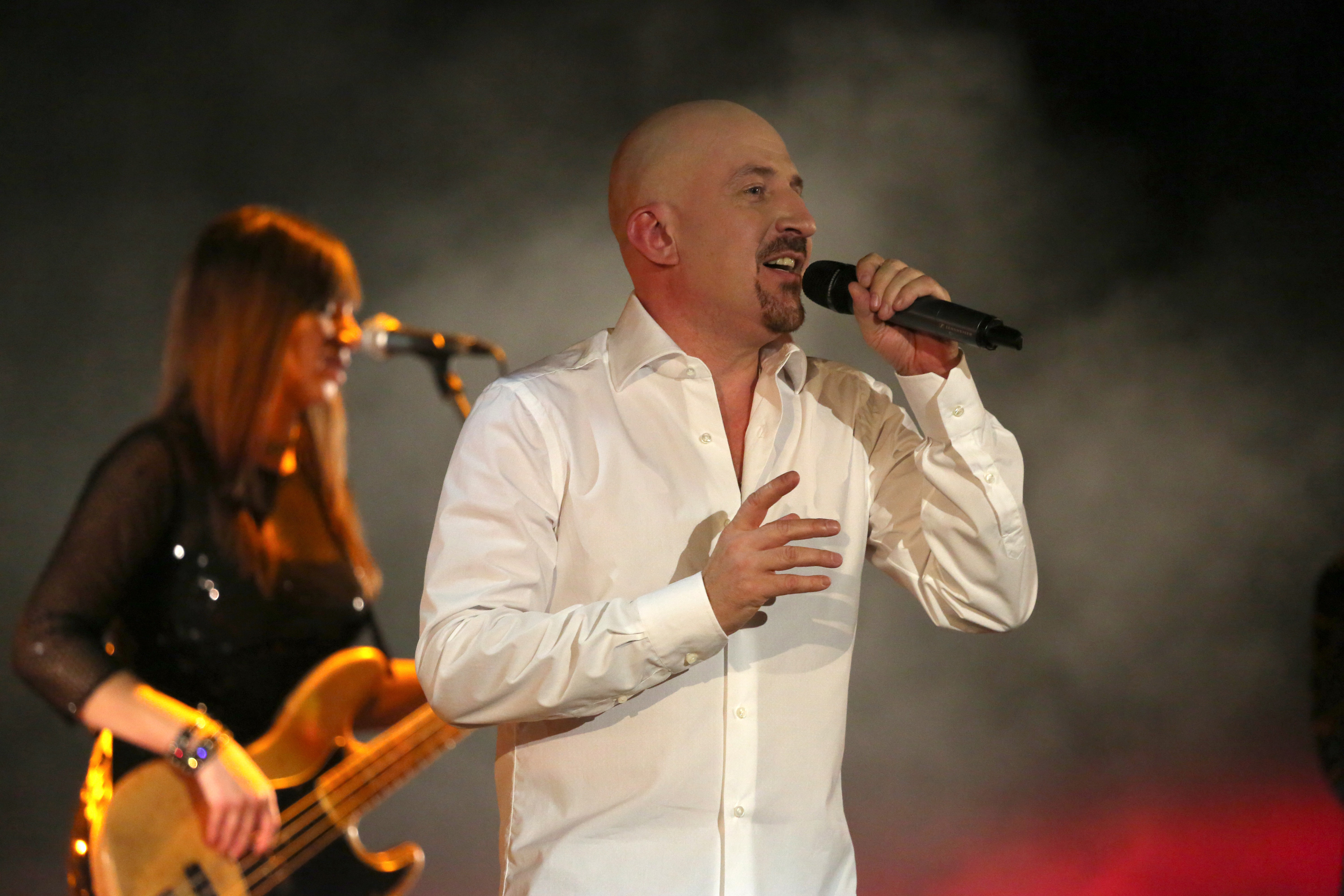 Концерт в ЦКИ "Меридиан", Москва, 2013